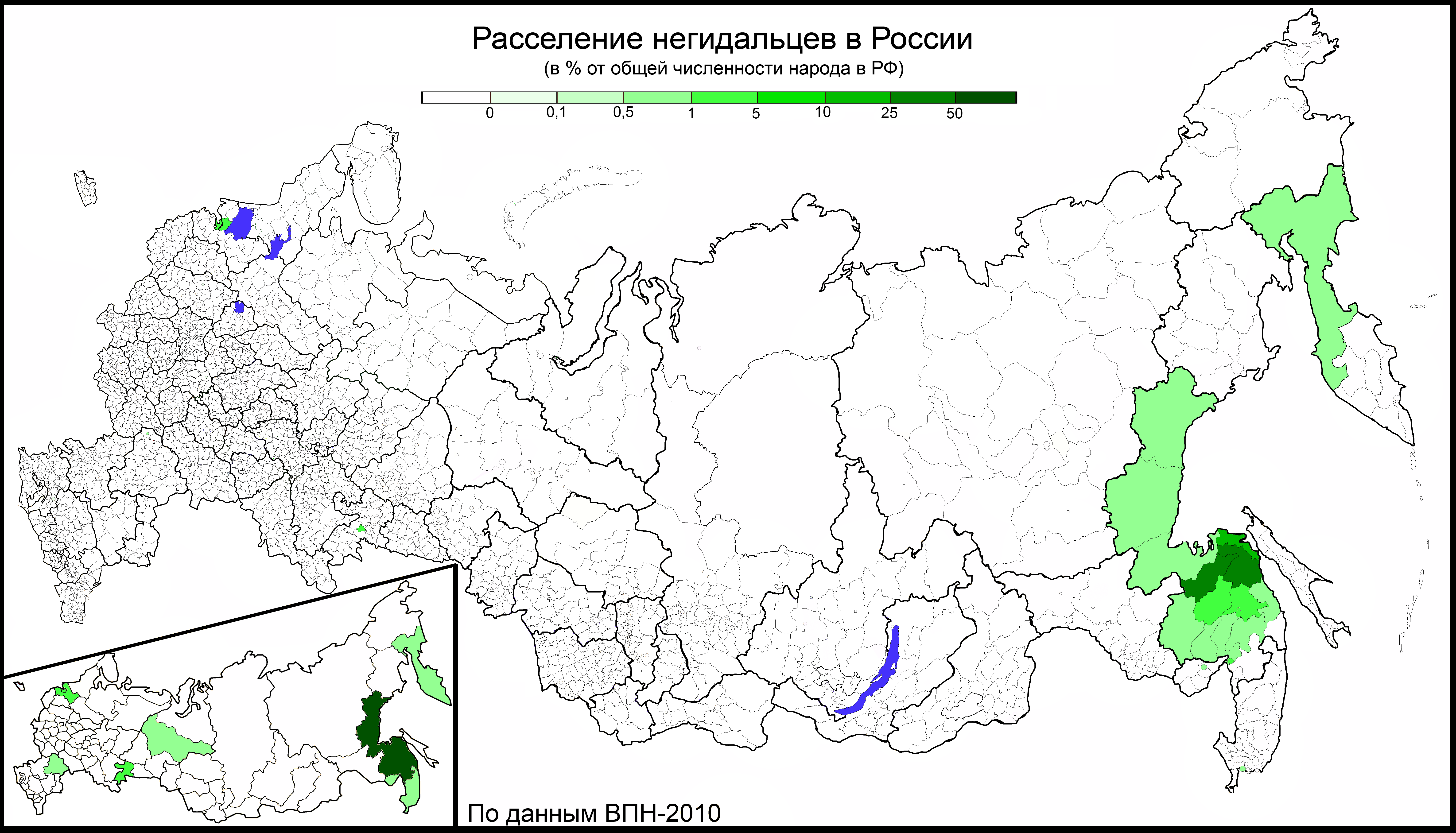 Расселение негидальцев в России по муниципальным районам и городским округам в % от общей численности этого народа в РФ. По переписи 2010 года